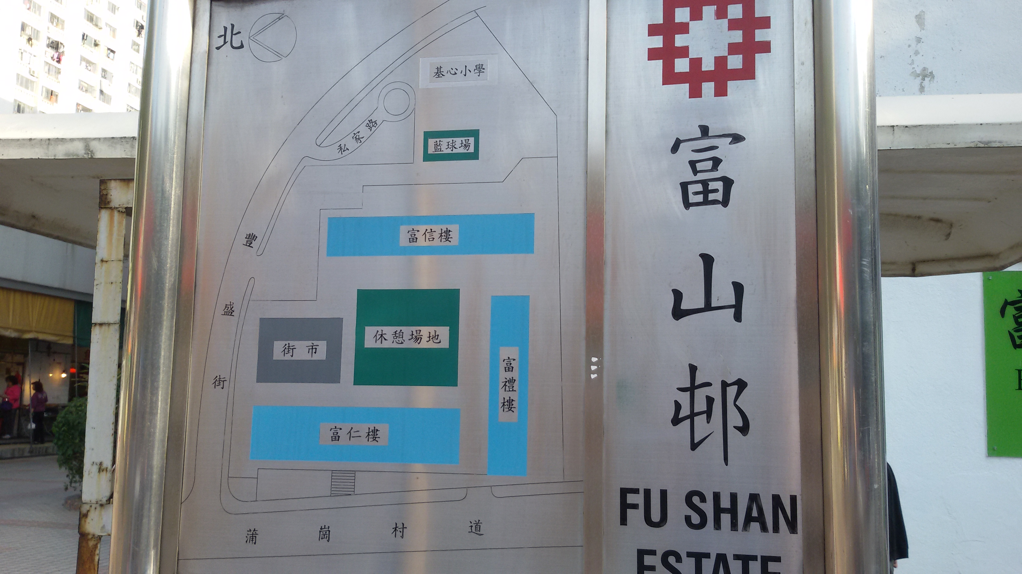 中文（香港）: 富山邨樓宇位置圖